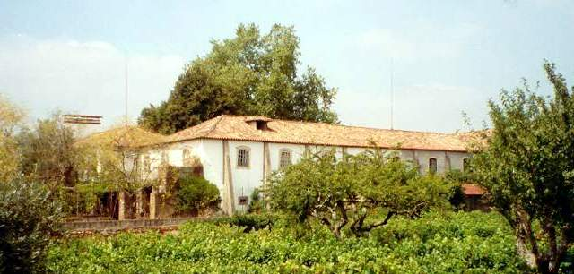 solar da Gândara de Mortágua, onde nasceu Tavares Festas. Gândara House, at Mortágua, where Tavares Festas was born